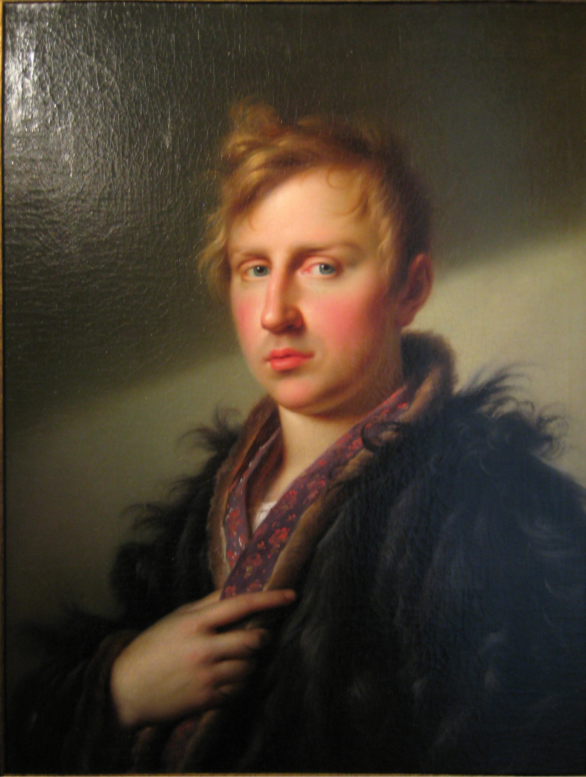 Джованни Баттиста Дамон Ортолани. Портрет князя Сергея (?) Сергеевича Голицына. 1800. Музей Тропинина. Ранее считался портретом его брата Владимира.